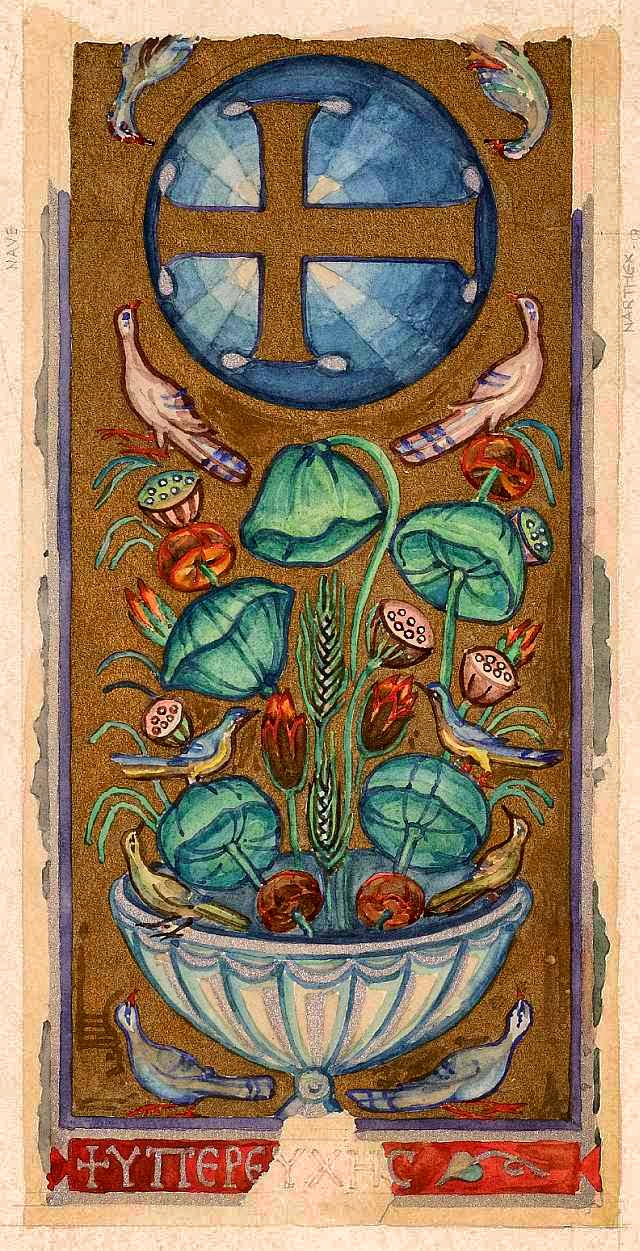 Mvskoke: Αχειροποίητος Εντοίχια ψηφιδωτά